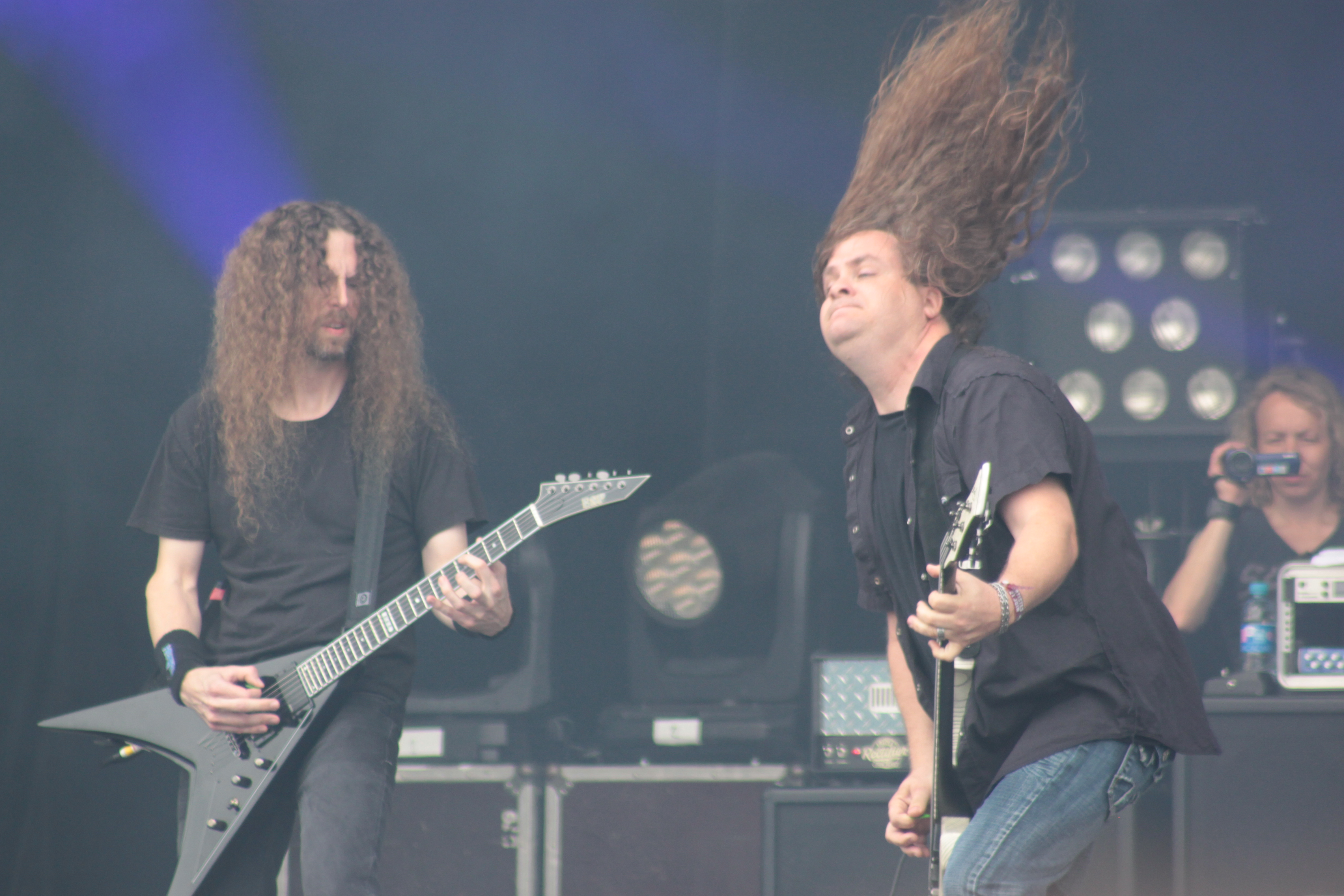 Kragen Lum, Jason Viebrooks, Heathen, Helfest 2013, Fr-44-Clisson.